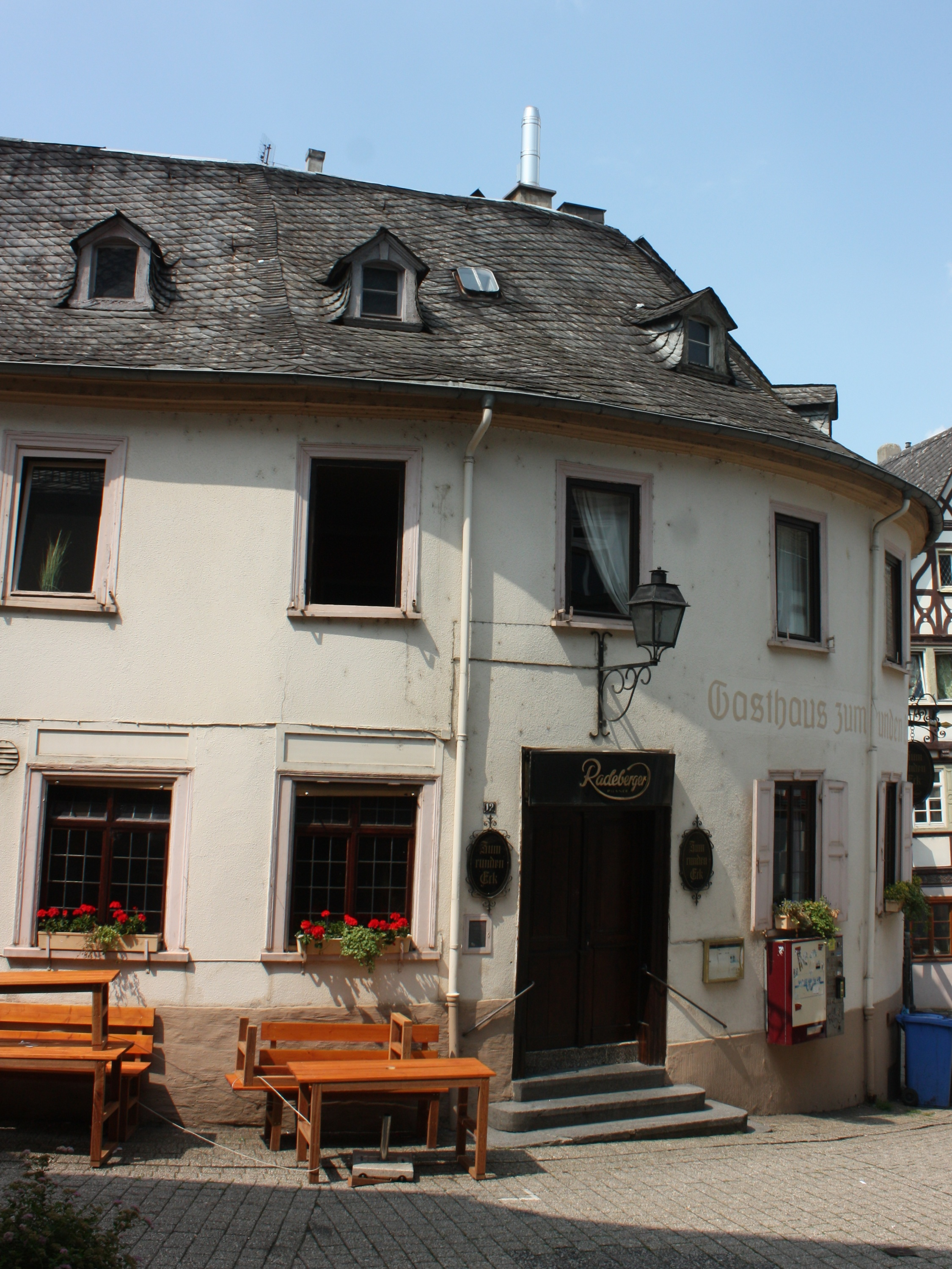 Limburg (Altstadt), Hessen: Halbrundes Gebäude